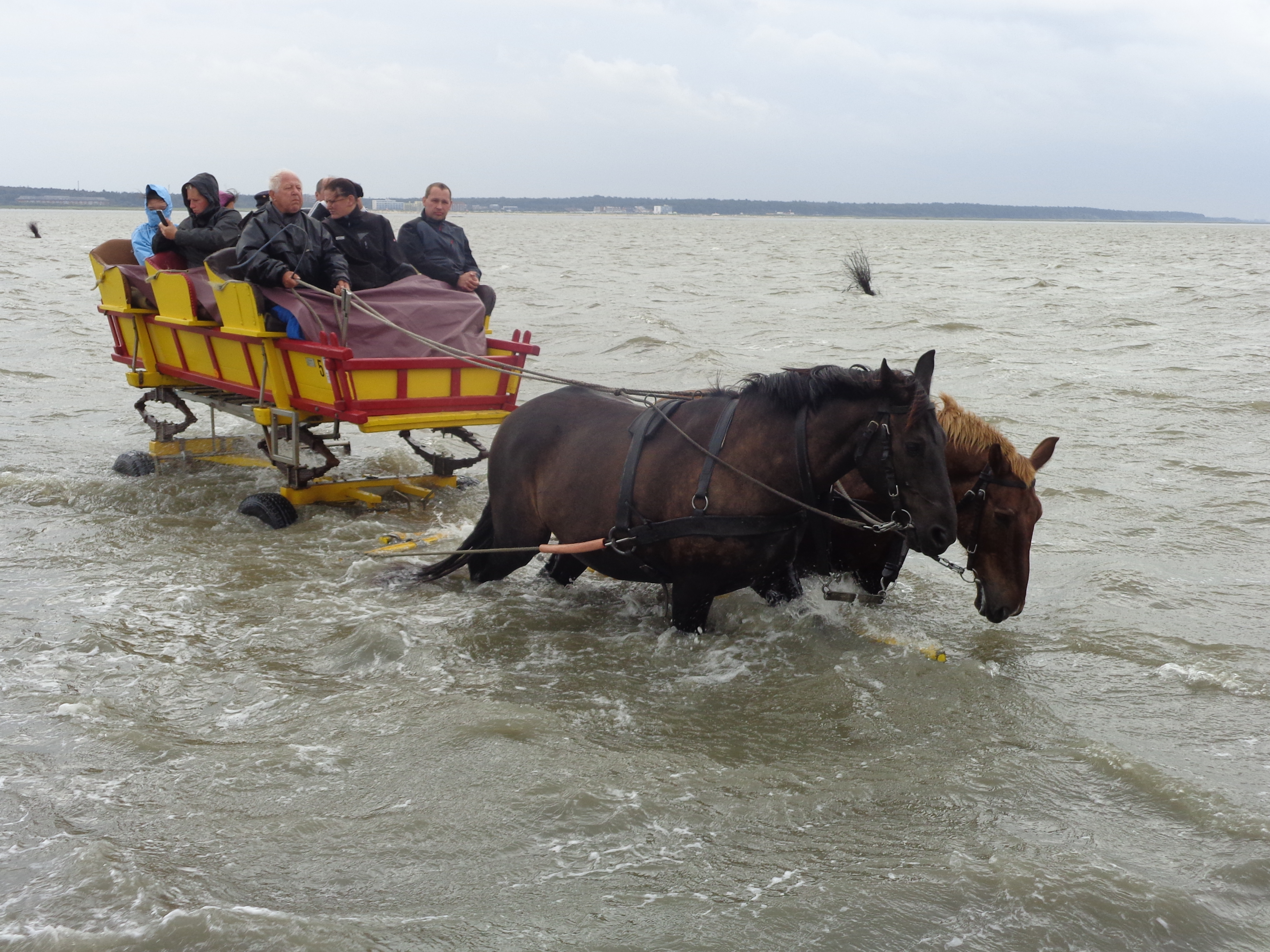 Wattwagen mit bauchtief ziehenden Pferden auf dem Weg von Duhnen nach Neuwerk.